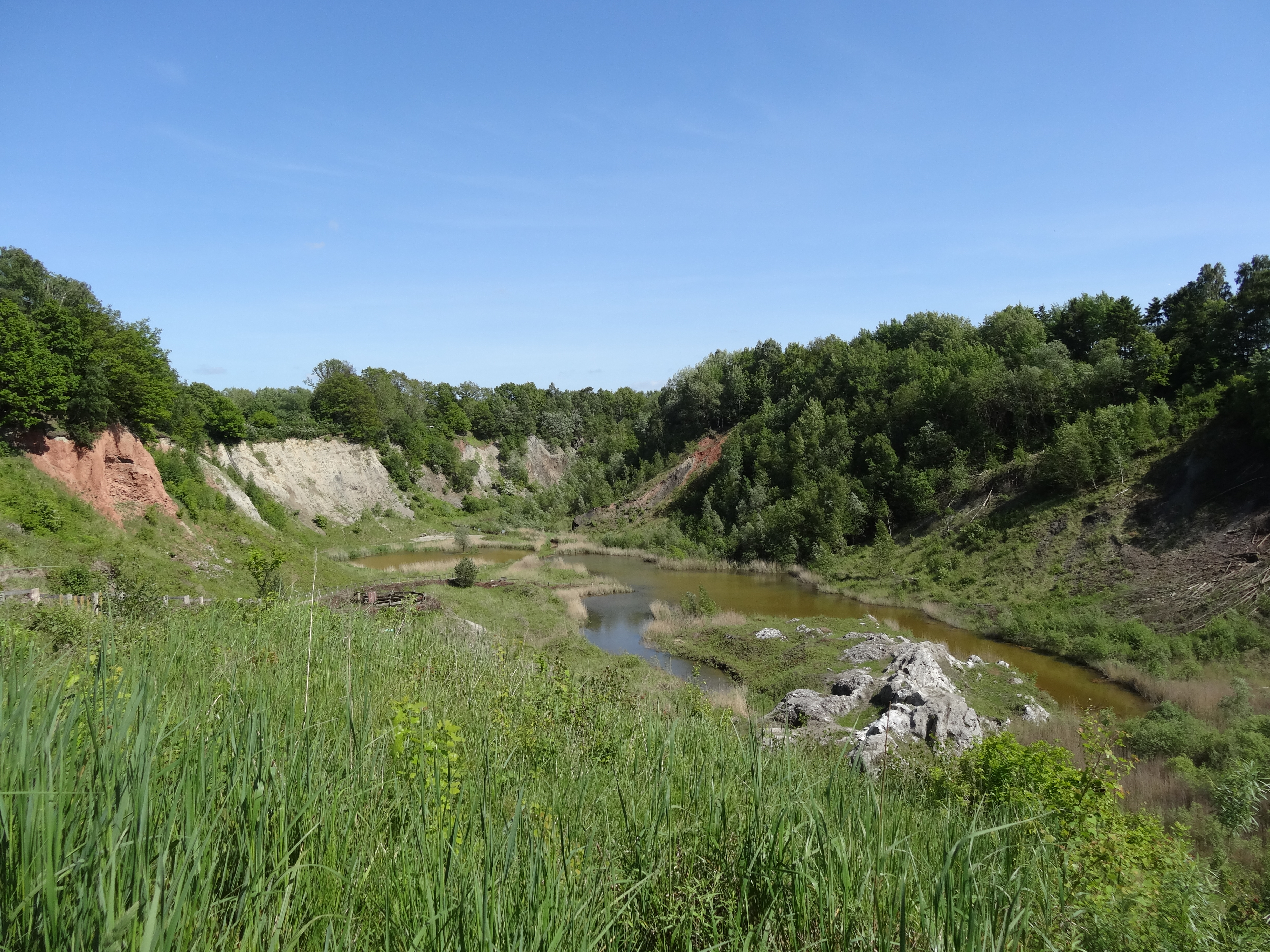 Bilder aus der Liether Kalkgrube